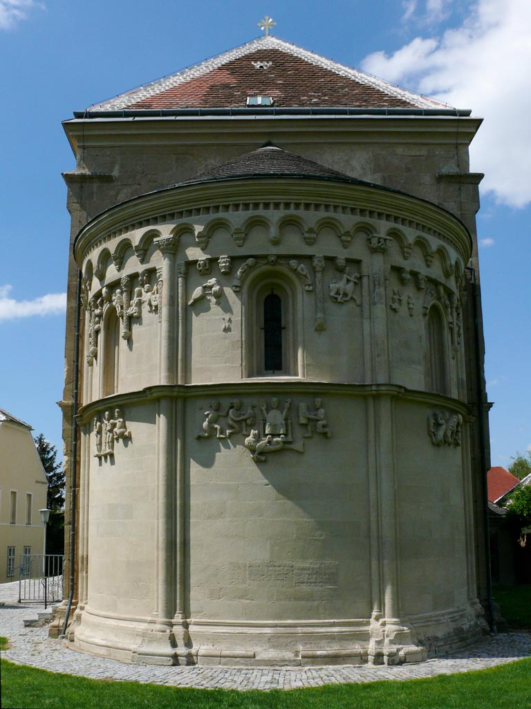 Schöngrabern, Romanische Pfarrkirche - Apsis